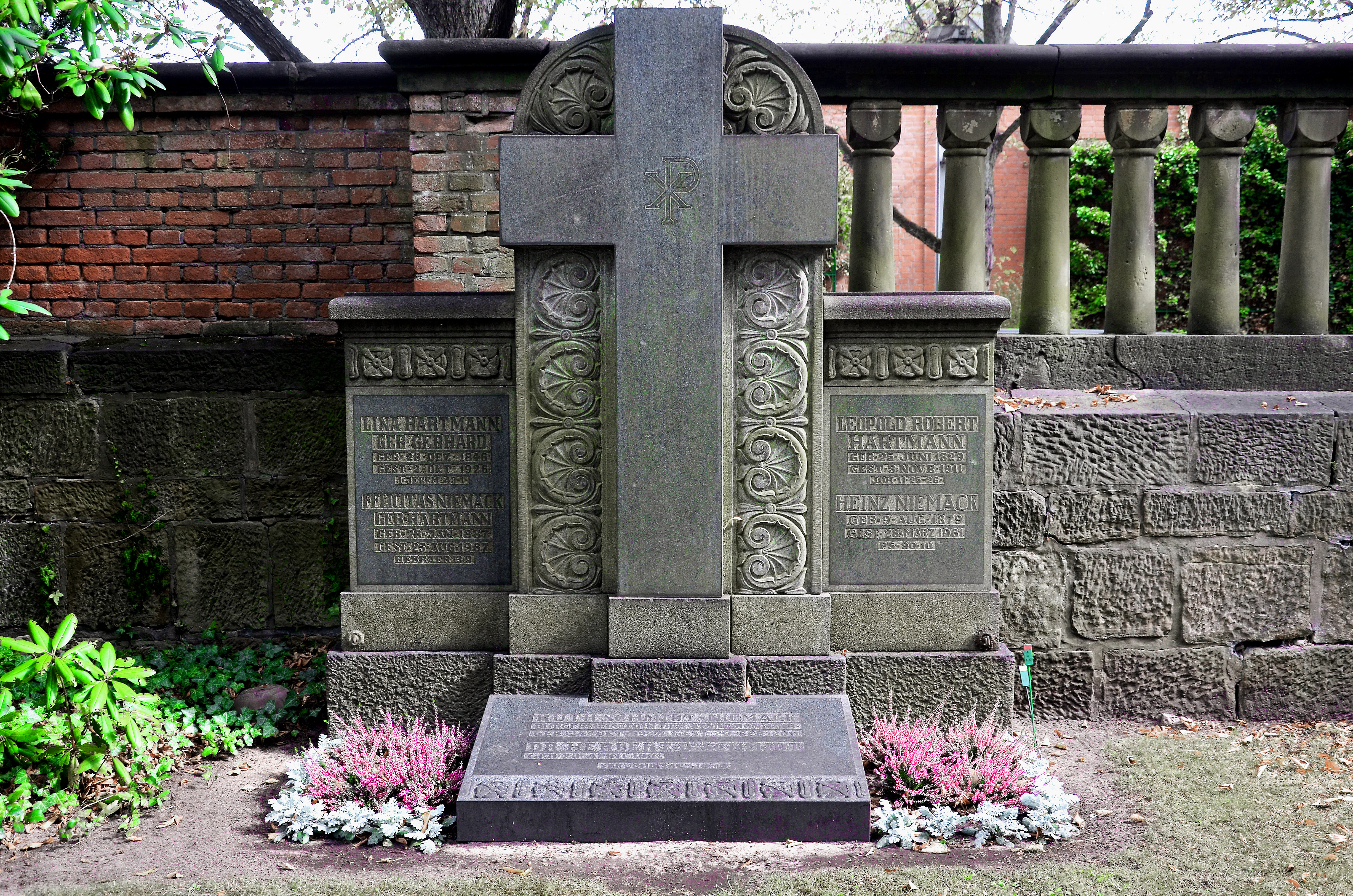 Grabsteine an der Aussenmauer zur Orli-Wald-Allee auf dem Stadtfriedhof Engesohde in Hannover mit der Familiengrabstätte von „Lina Hartmann, geborene Gebhard, 28. Dezember 1846 bis 2. Oktober 1926“ „Leopold Robert Hartmann, geboren 25. Juni 1829 bis 3. November 1911“ „Felicitas Niemack, geborene Hartmann, 28. Januar 1887 bis 25. August 1967“ „Heinz Niemack, geboren 9. August, gestorben 28. März 1961“ Am Fuß des Kreuzes liegt ein weiterer Grabstein für „Ruth Schmidt-Niemack / Bürgermeisterin der Stadt Bonn / geboren 24. Oktober 1927, gestorben 20. Februar 2011“ sowie „Dr. Herbert B. Schmidt / geboren 20. April 1931 ...“ ...